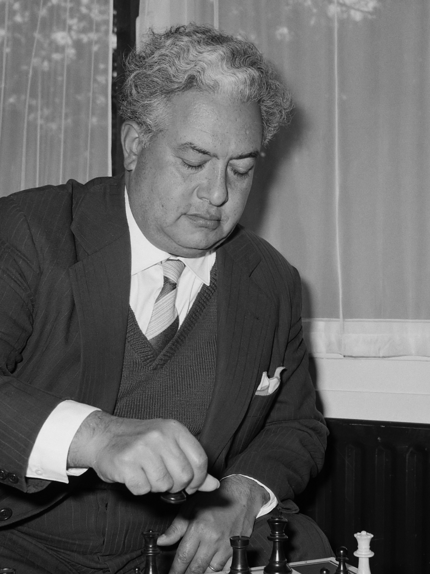 Peter Stuyvesant Schaaktoernooi in Zevenaar. Argentijn C. E. Guimard 23 oktober 1961